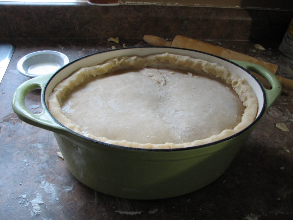 Tourtière du Lac Saint-Jean prête à cuire